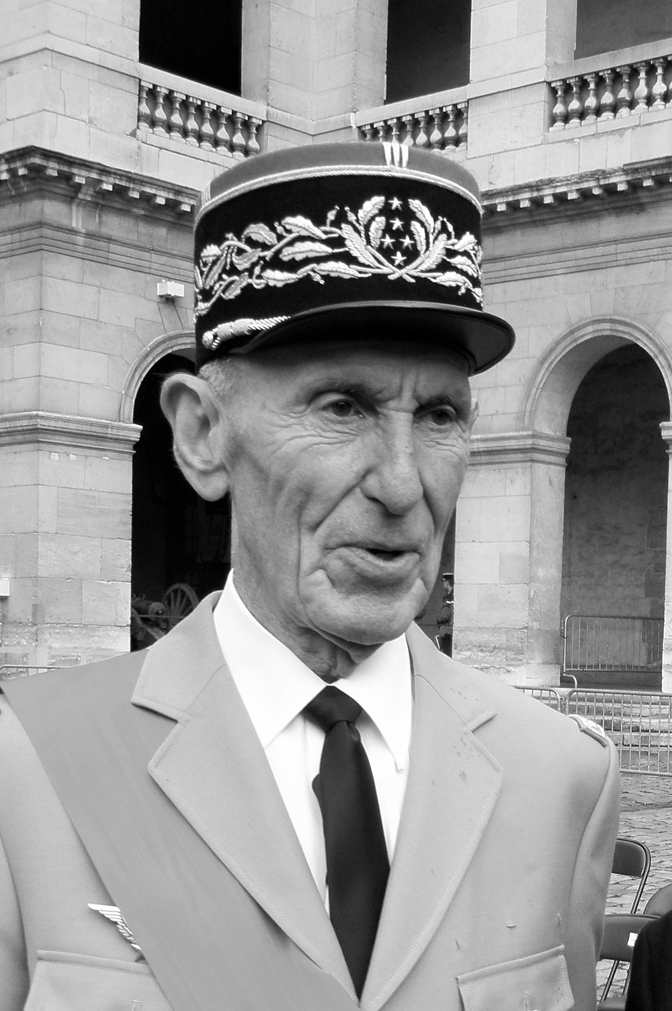 Le général Jacques Servranckx aux Invalides en 2007.